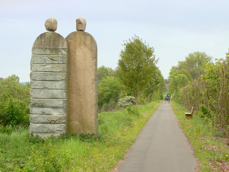 Skulpturenweg Lamspringe mit Skulptur Begegnungen (1998) von Andrzej Irzykowski